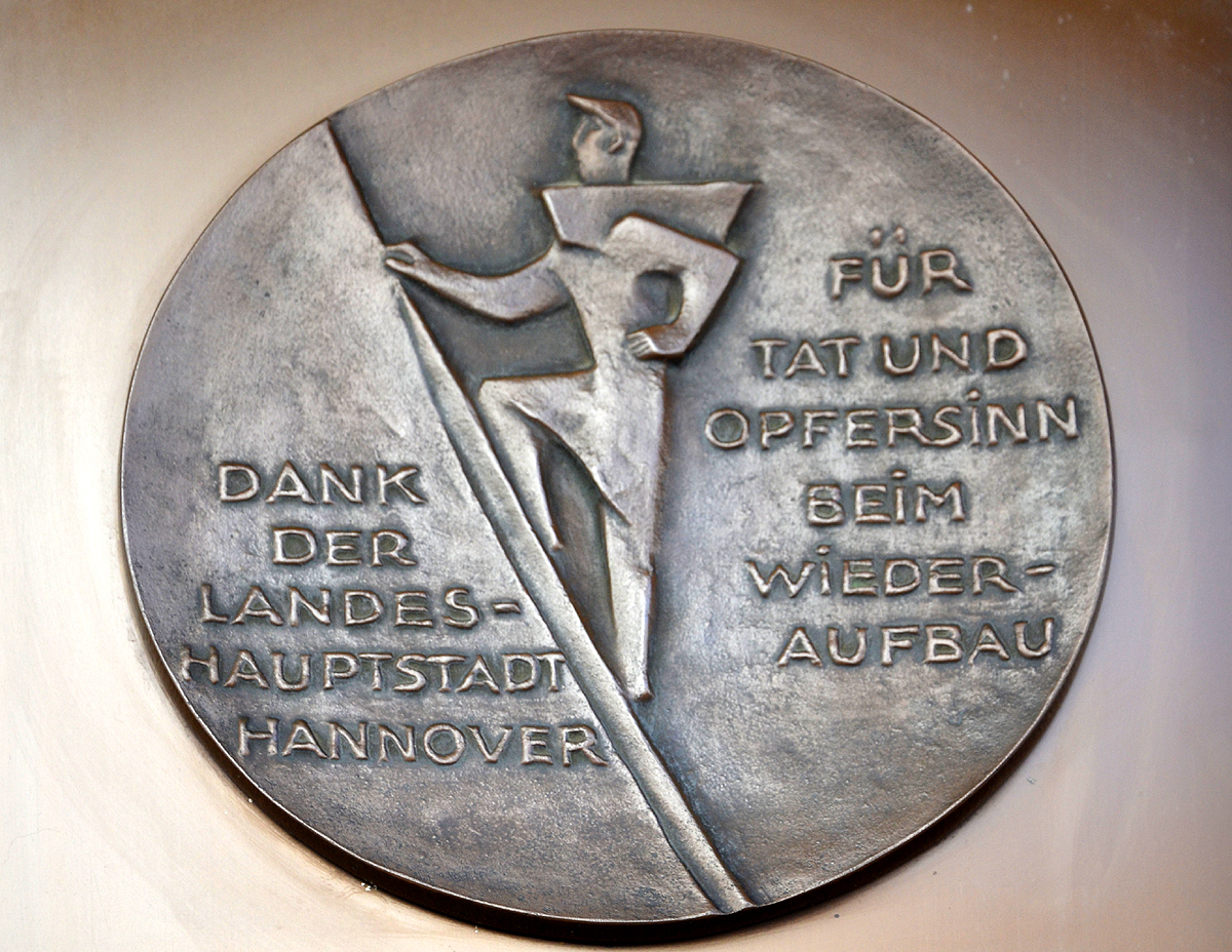 Nachdem der Unternehmer Hugo Kaiser vom Mäntelhaus Kaiser zum Wiederaufbau und insbesondere für die autogerechte Verbreiterung der Karmarschstraße der Stadt Hannover unentgeltlich einen Teil seines Grundbesitzes überlassen hatte, ehrte ihn die niedersächsische Landeshauptstadt mit einer noch heute am seinerzeit neu errichteten Gebäude angebrachten Plakette: „Dank der Landeshauptstadt Hannover für Tat und Opfersinn beim Wiederaufbau“ ...